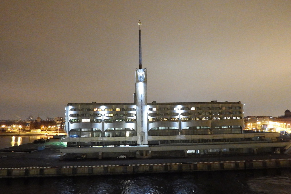 Морской вокзал ночью